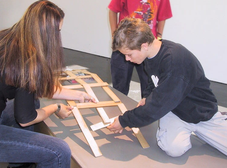 Besucher bauen eine Leonardo Brücke im Mathematikum Gießen. Die abgebildeten Personen haben der Veröffentlichung zugestimmt.